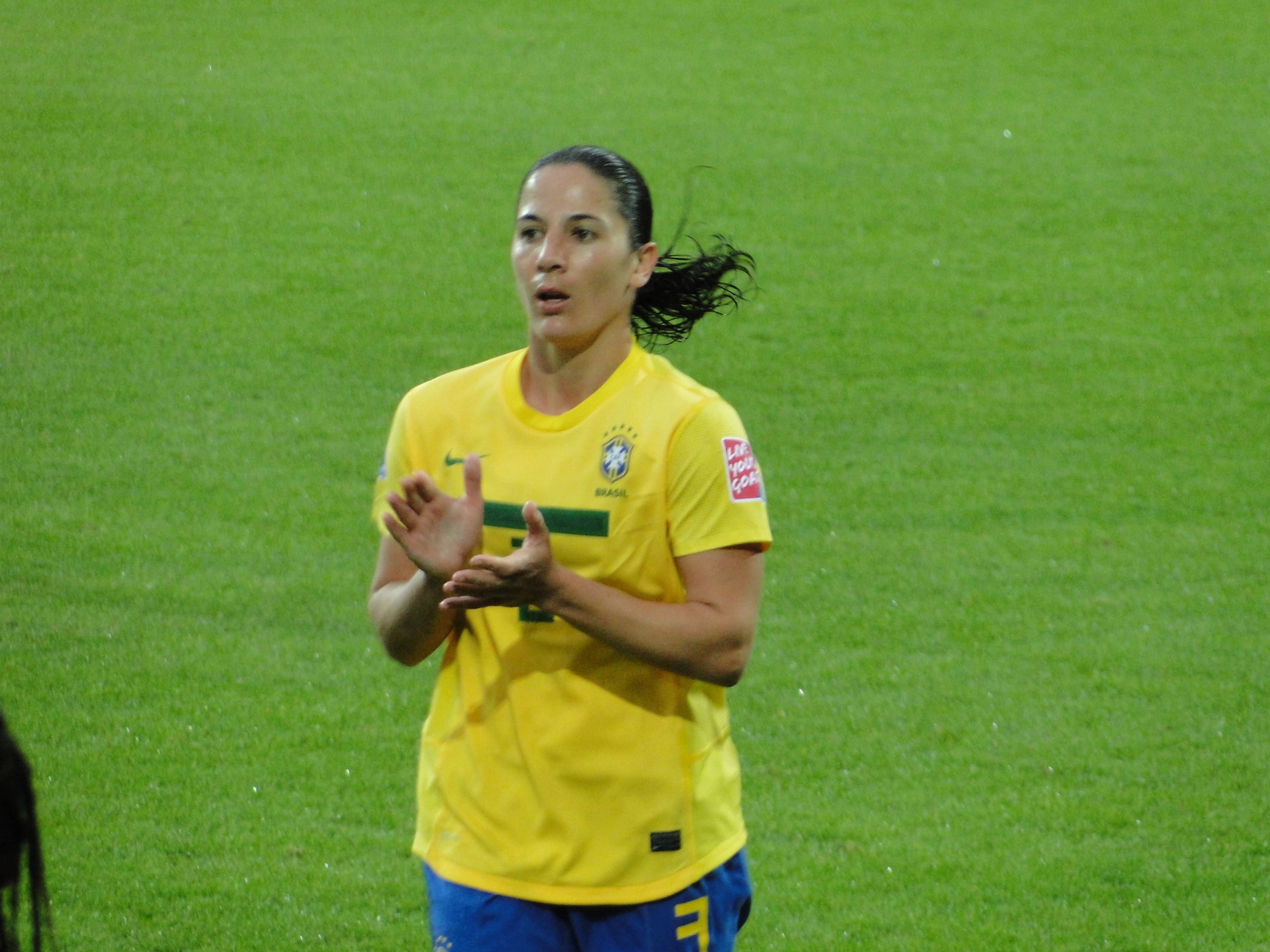 Daiane Menezes Rodrigues - Match de phase de groupes de la coupe du monde entre le Brésil et la Norvège le 3 juillet 2011 à Wolfsbourg